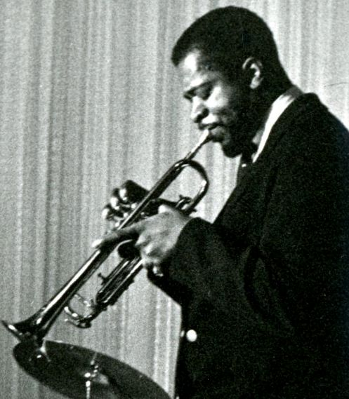 Donald Byrd en concert